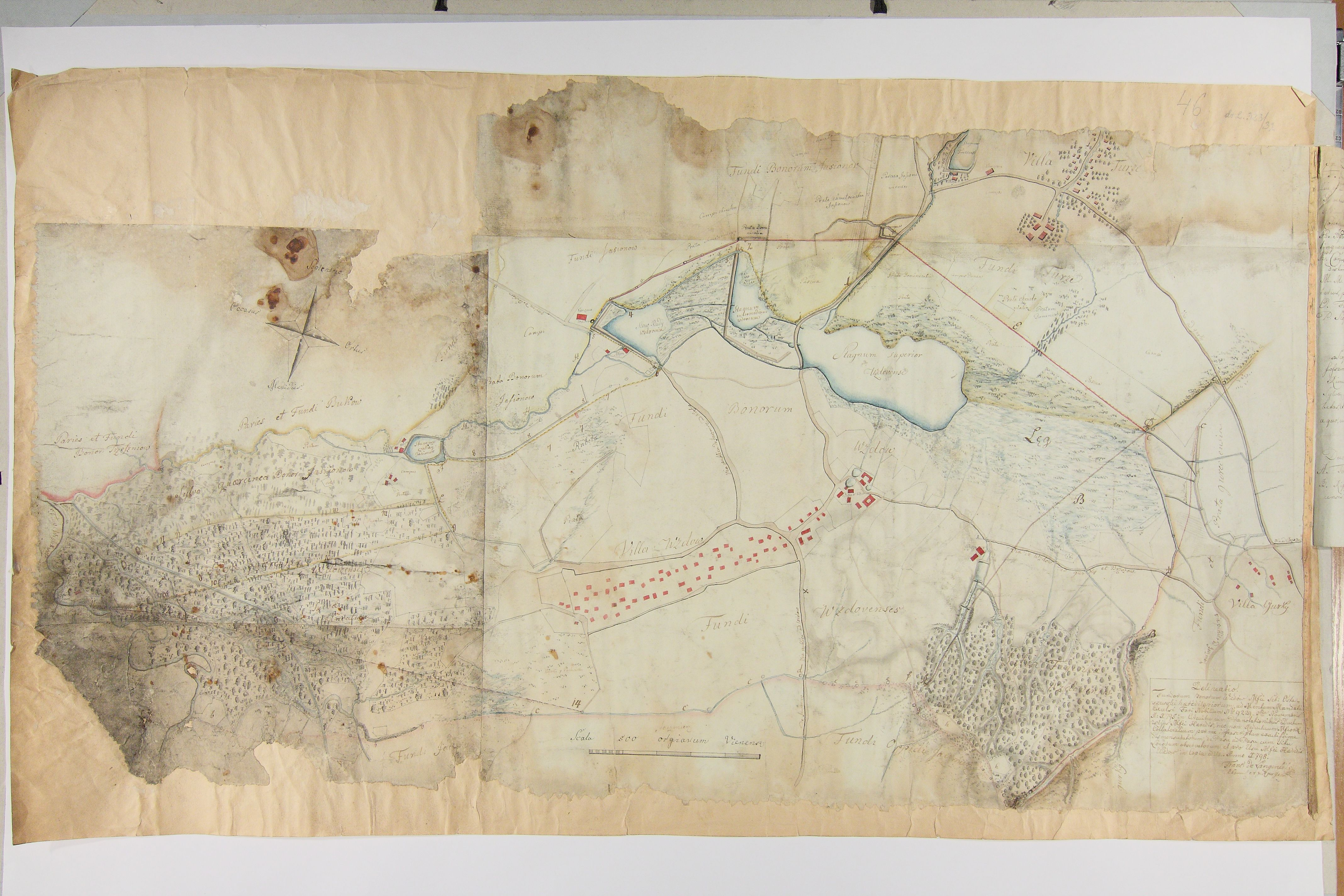 "Delineatio fundorum bonorum Wzdów [in Polonia] Magnifici Sebastiani Ostaszewski haereditariorum... Anno 1798"